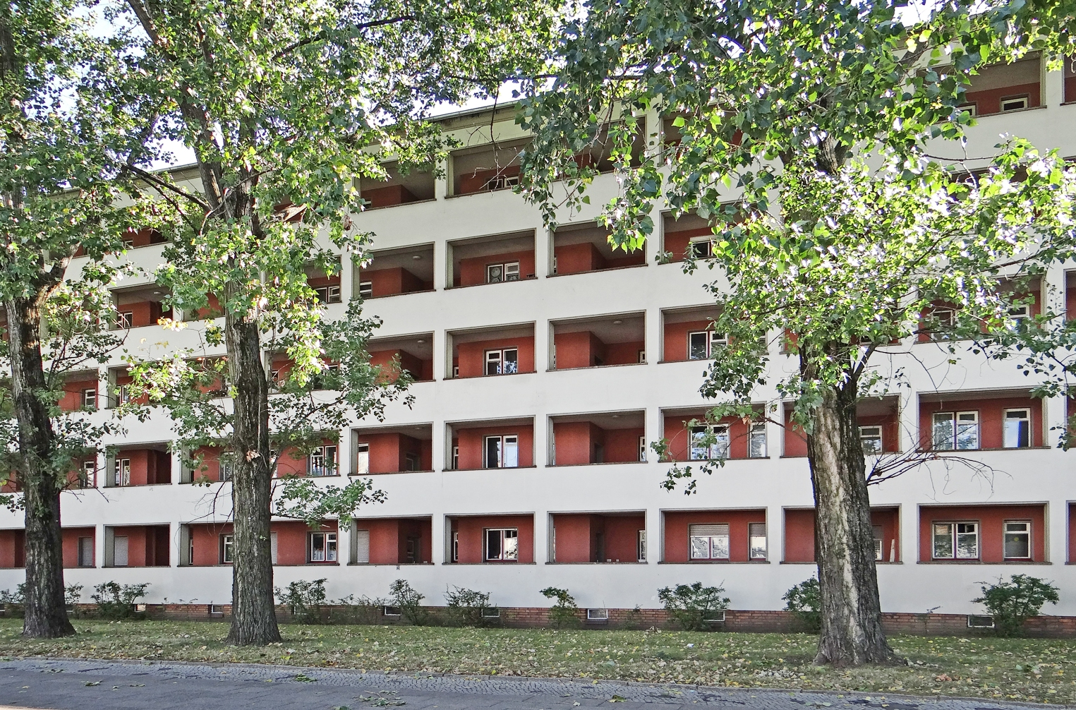 Laubenganghäuser / Access Balcony Houses (façade nord) Les appartements sont tous accessibles par une loggia parallèle à la façade. Ces modestes immeubles d'habitation ont été les premiers construits sur la Karl-Marx-Allee (1950). Il s'agissait de répondre en urgence aux besoins des habitants de ce quartier en grande partie détruit lors des combats avec l'armée rouge qui est entrée dans Berlin par cette voie. Les architectes : Hans Scharoun, Herbert Klatt, Ludmilla Herzenstein, Karl Brockschmidt ont imaginé des standards constructifs (inspirés par les principes du Bauhaus) pour doter rapidement chaque appartement d'un confort simple et moderne. Le Gouvernement de la RDA a arrêté ce programme en 1950 pour s'engager dans des constructions plus spectaculaires, voulant faire de la Karl-Marx-Allee un boulevard servant de vitrine au socialisme. Il a fait planter des peupliers devant ces immeubles pour en cacher la vue.